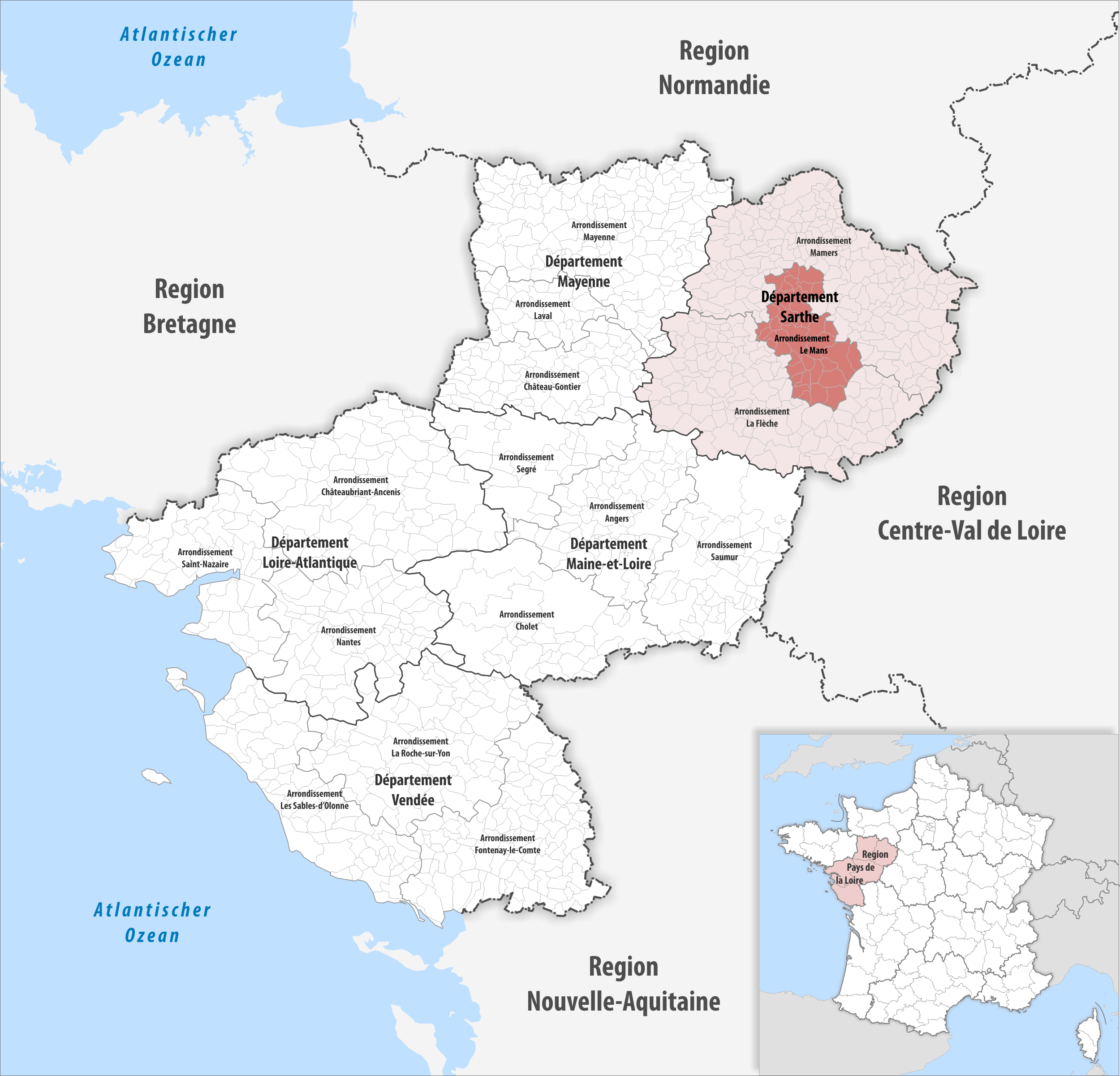 Lage des Arrondissements Le Mans